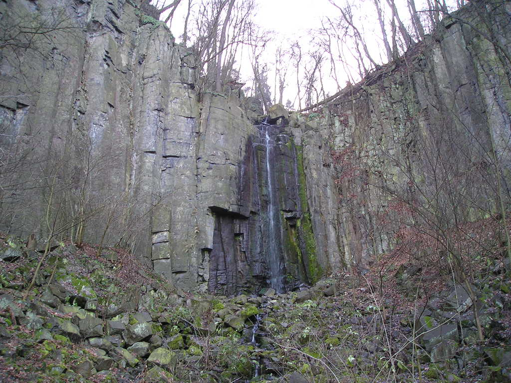 Cesta k vodopádům, nad Větruší.